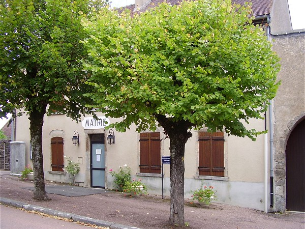 Mairie de Cervon